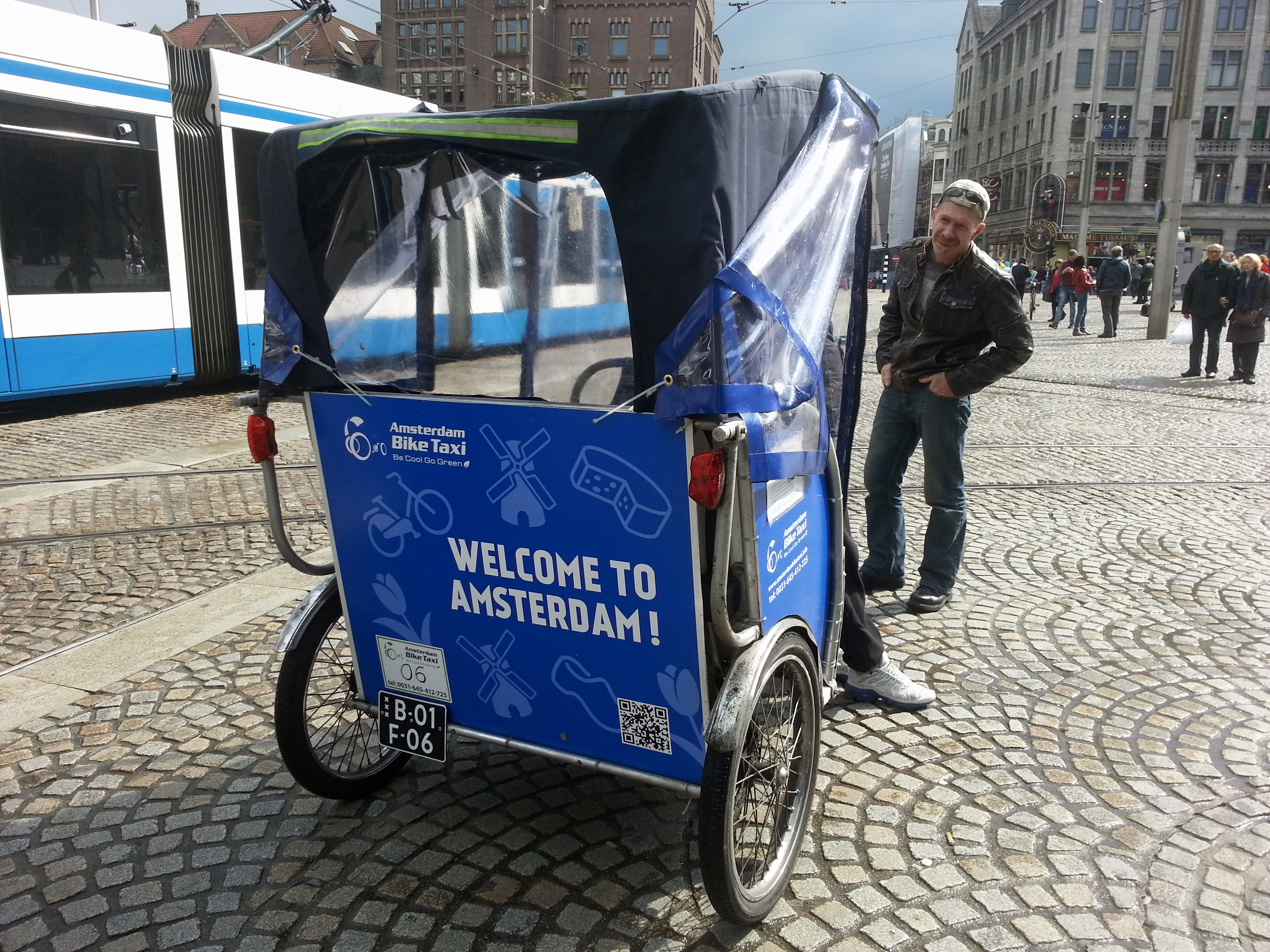 Registratieplaat voor fietstaxi's in Amsterdam, per 1 april 2013 noodzakelijk voor het verkrijgen van een vergunning voor Alternatief Personenvervoer.